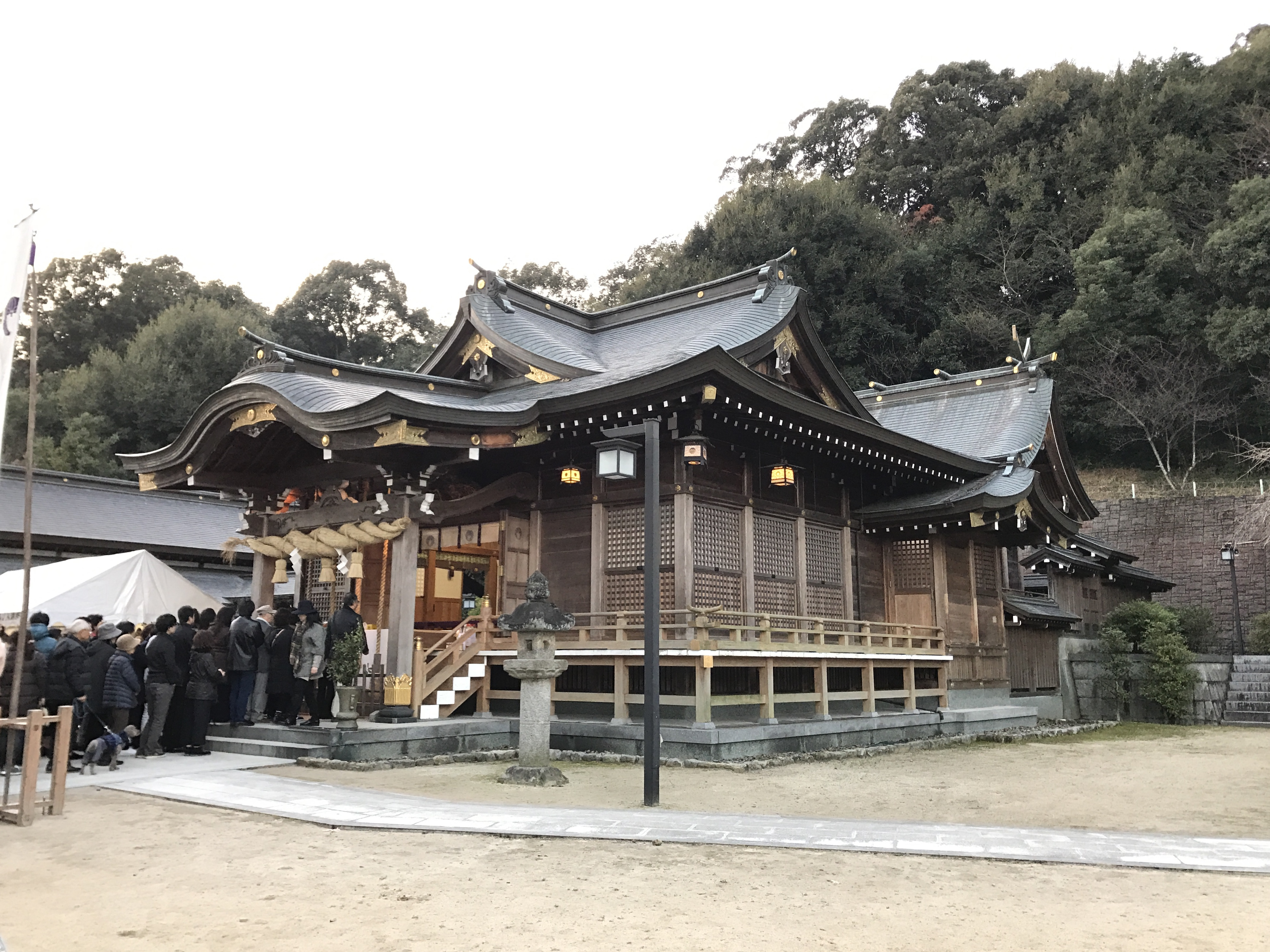 春日神社の社殿